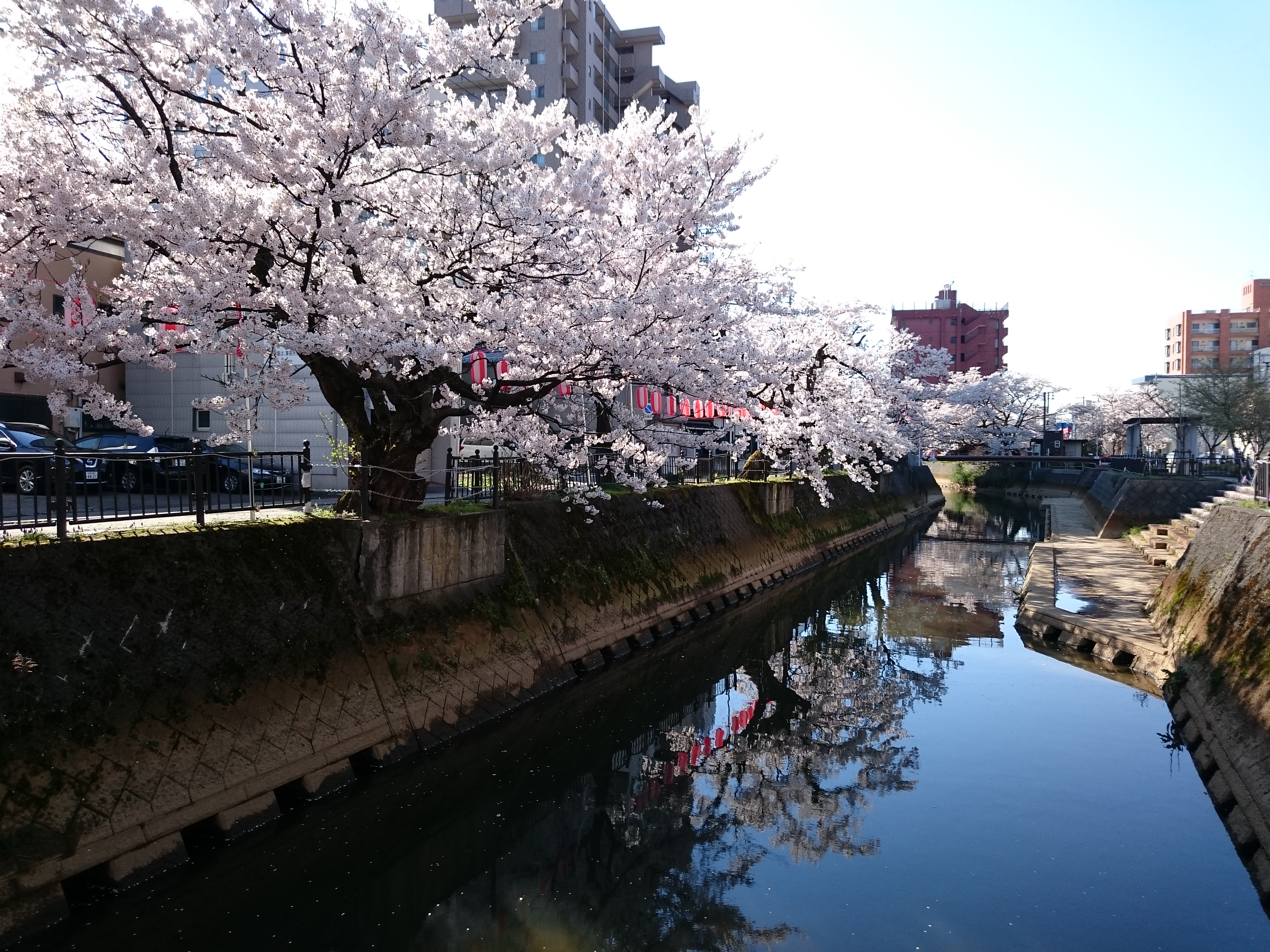 桜が咲いている時期の柿川（長岡市殿町）